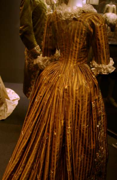 Robe à l'Anglaise c. 1780 in the Fashion Museum Ludwigsburg Source: La Couturière Parisienne